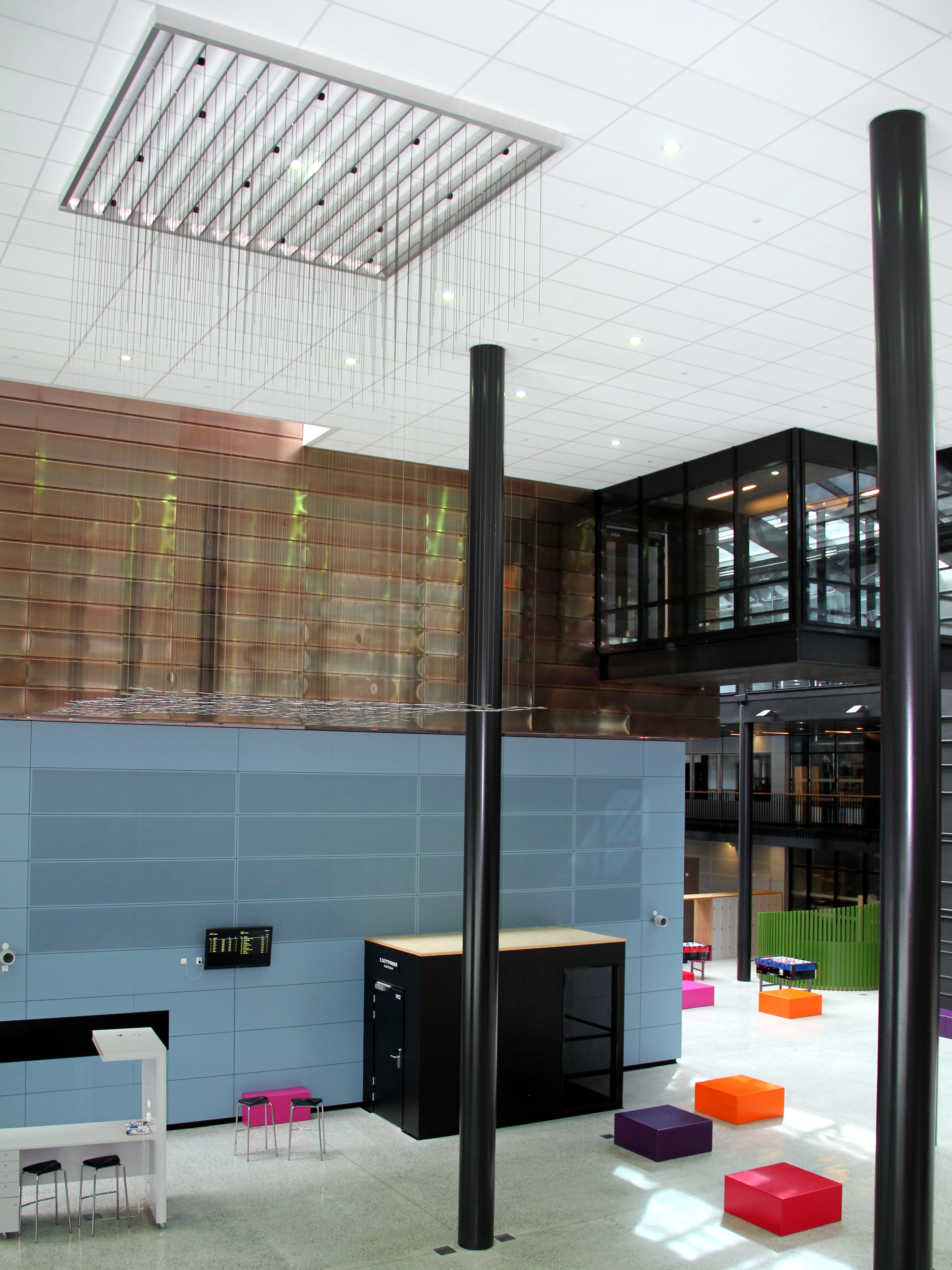 Fra skolens foajè med det dynamiske verket "Bølgen" av Kristoffer Myskja hengende fra taket